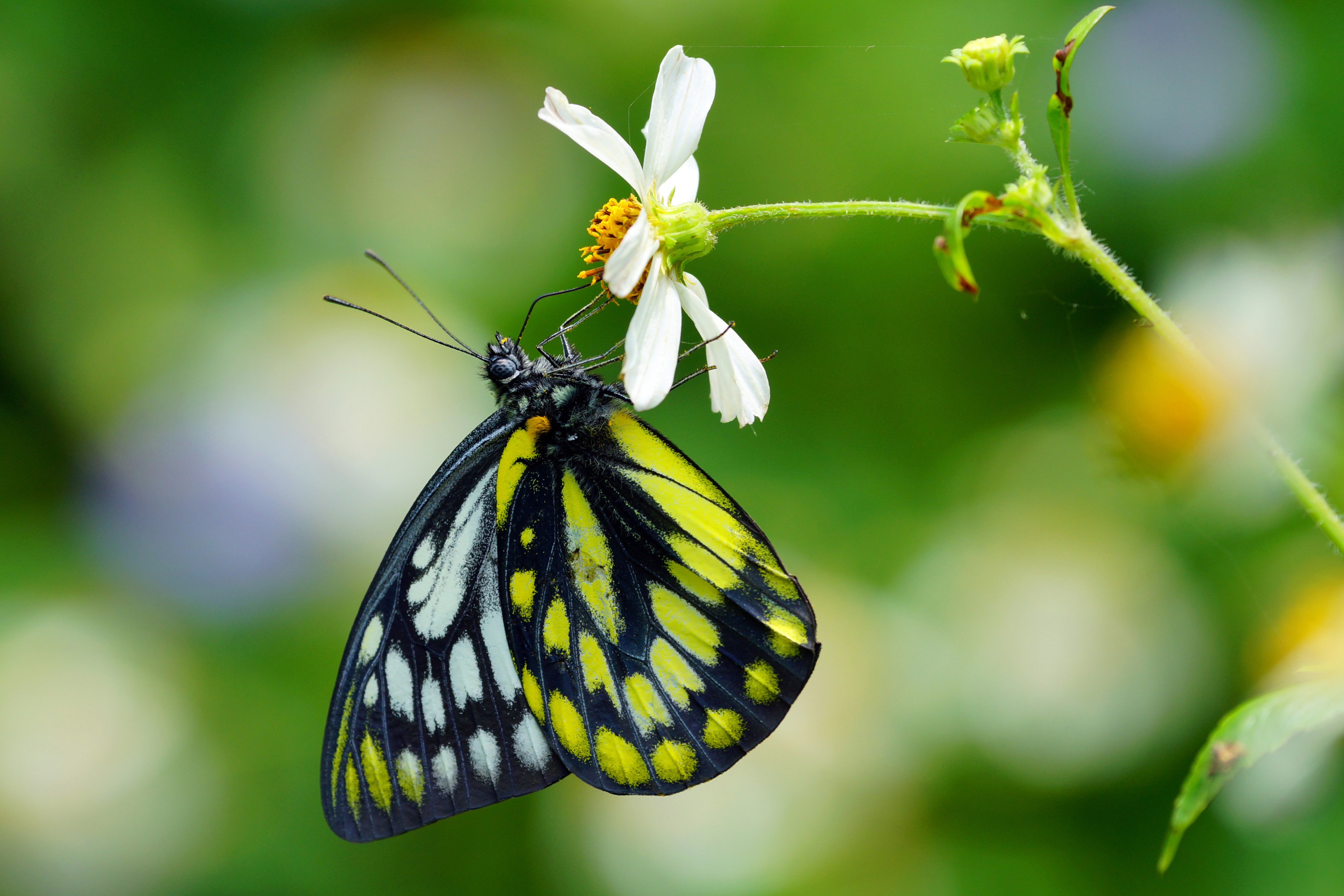 鋸粉蝶 Prioneris thestylis formosana